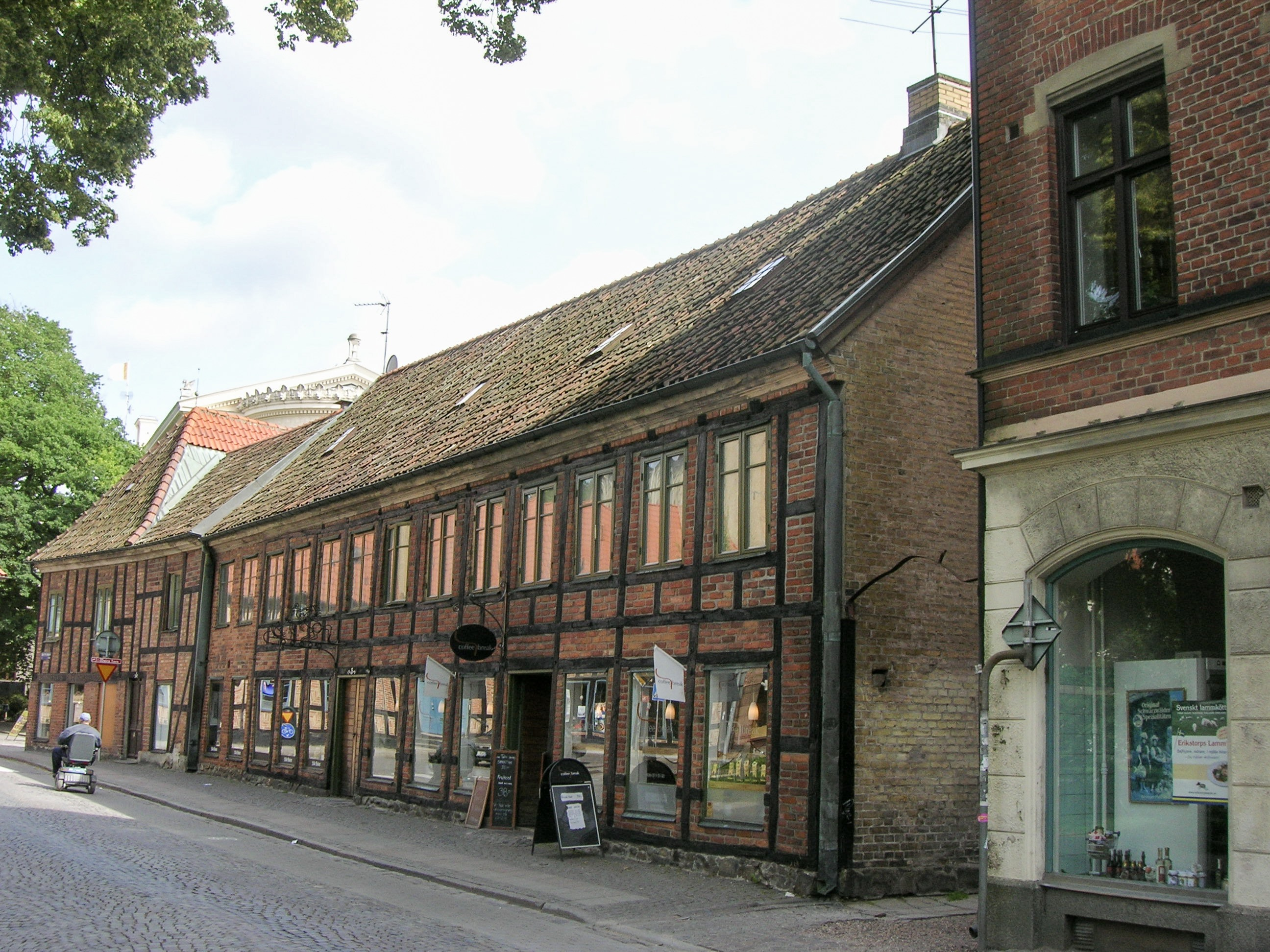 Glädjen 15, byggnadsminne i Lund.